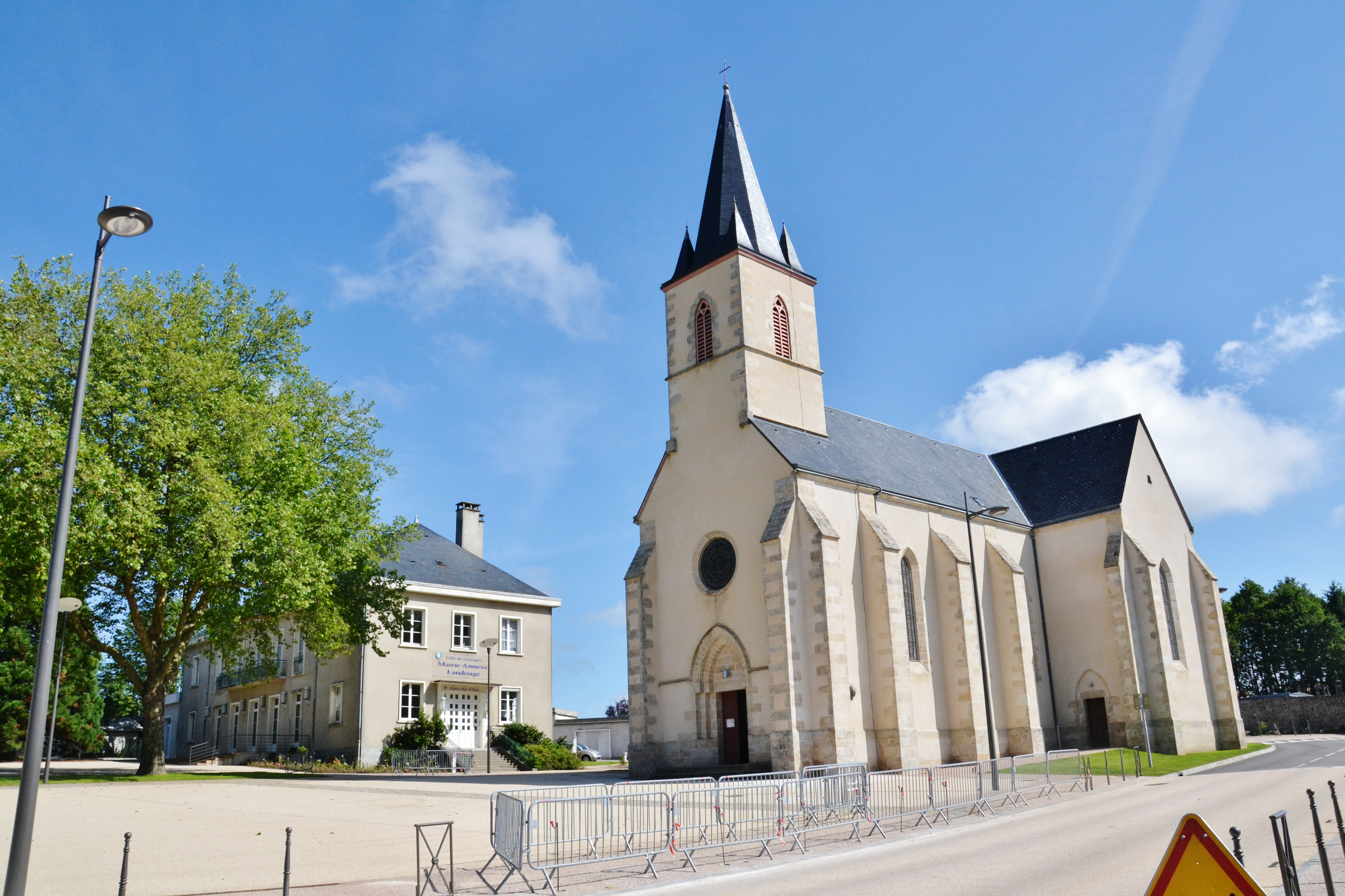 L'église et la mairie-annexe de Landouge, commune de Limoges (Haute-Vienne, France)